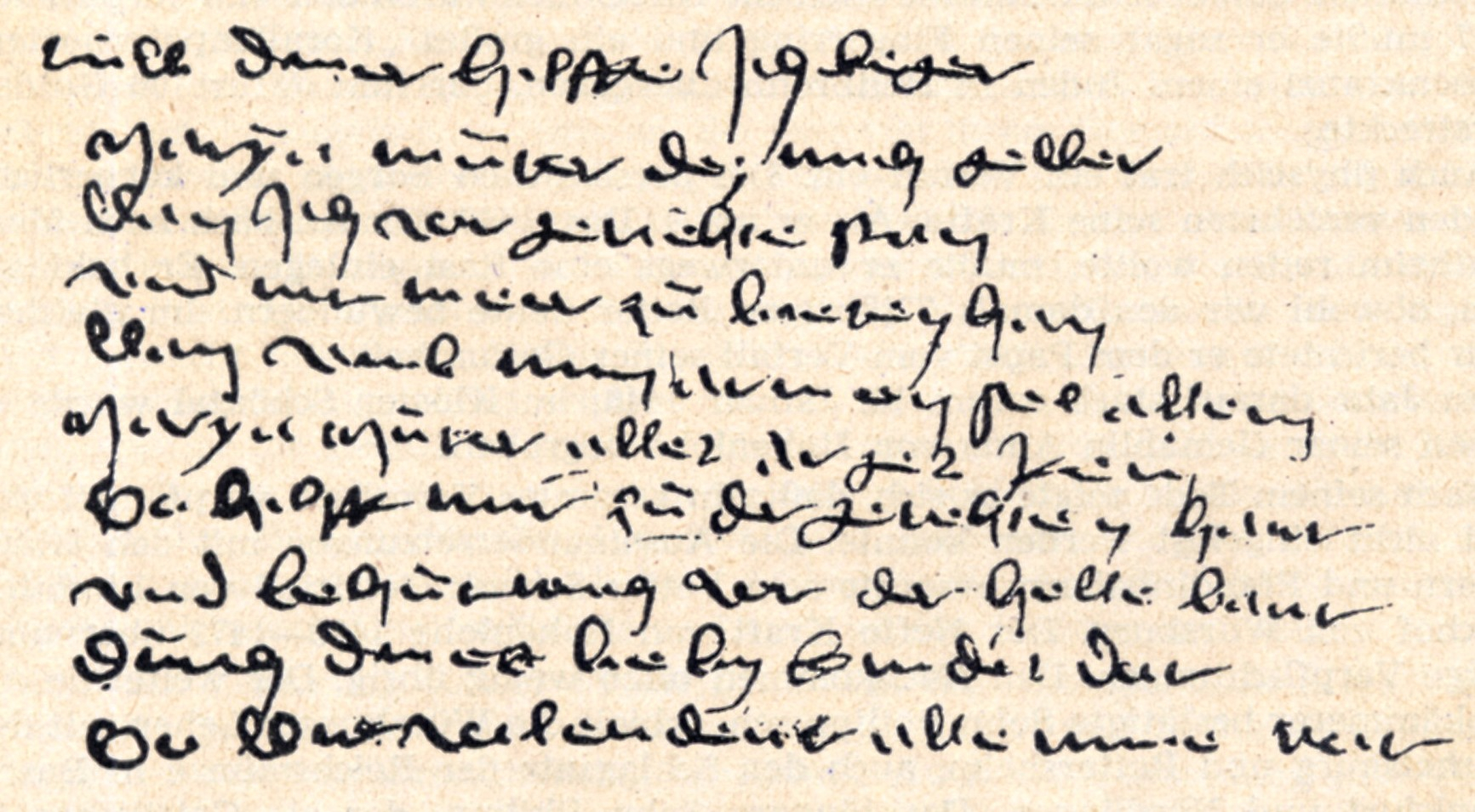 Religiöses Gedicht des Konrad von Weinsberg (Version des Ave Maria)